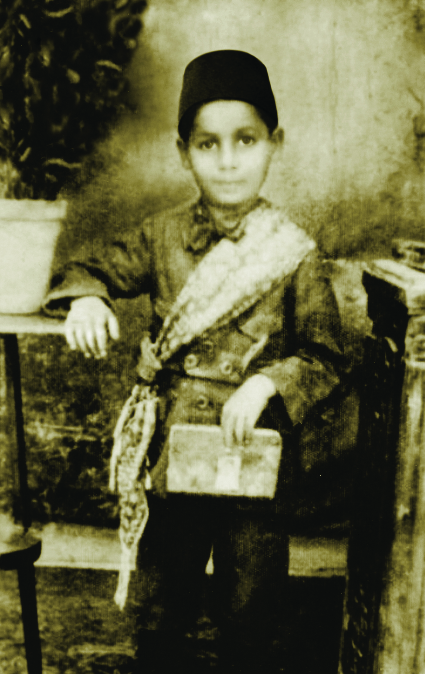 العلايلي في سن الحادية عشر بعد حفظه لألفية ابن مالك